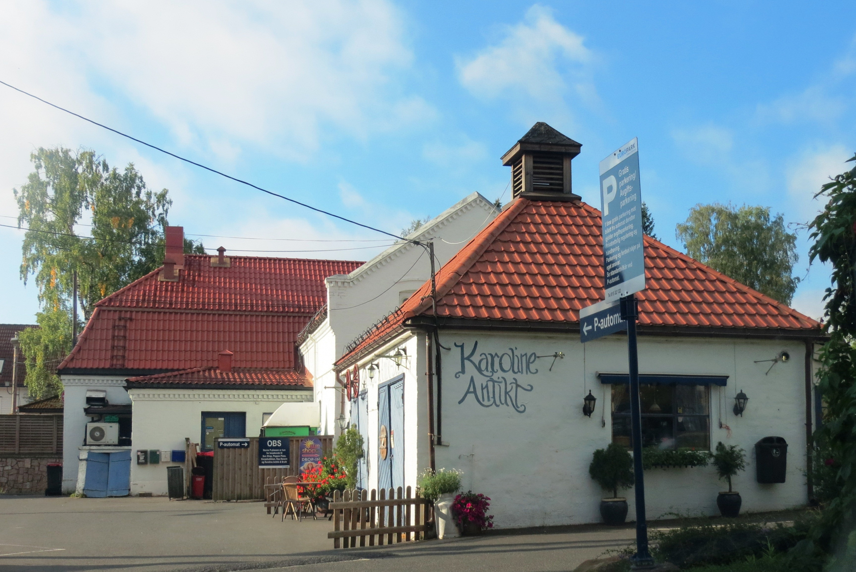 Lokalt vernet bygning på Røa i bydel Vestre Aker, Oslo